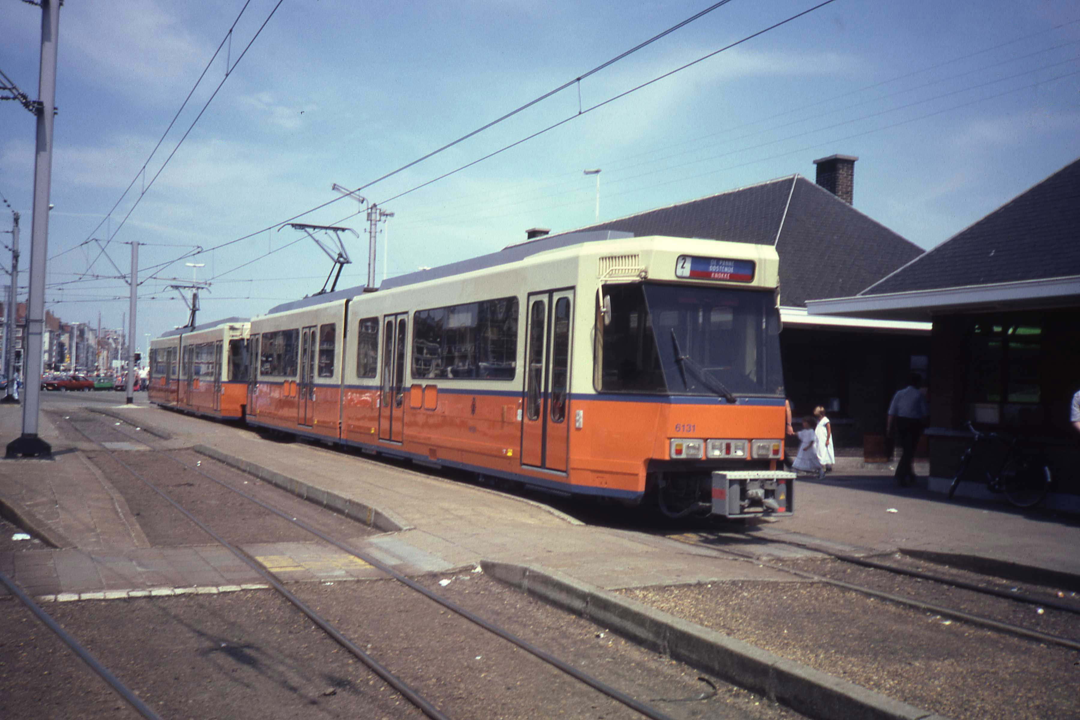 Gekoppeld rijden van twee BN trams in Oostende